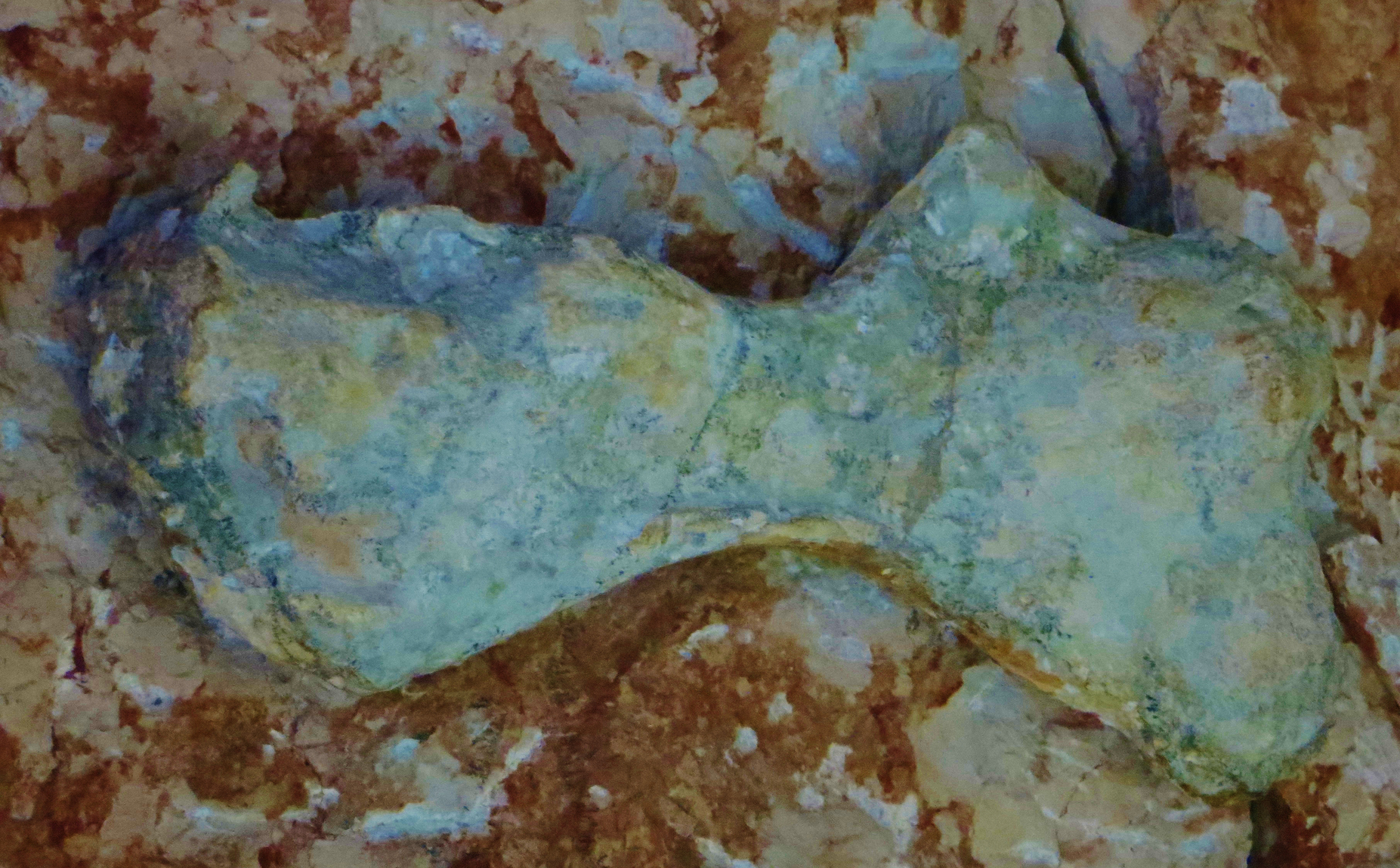 Fossil of Protosphargis veronensis, an extinct turtle- Took the photo at Museo di Storia Naturale di Verona